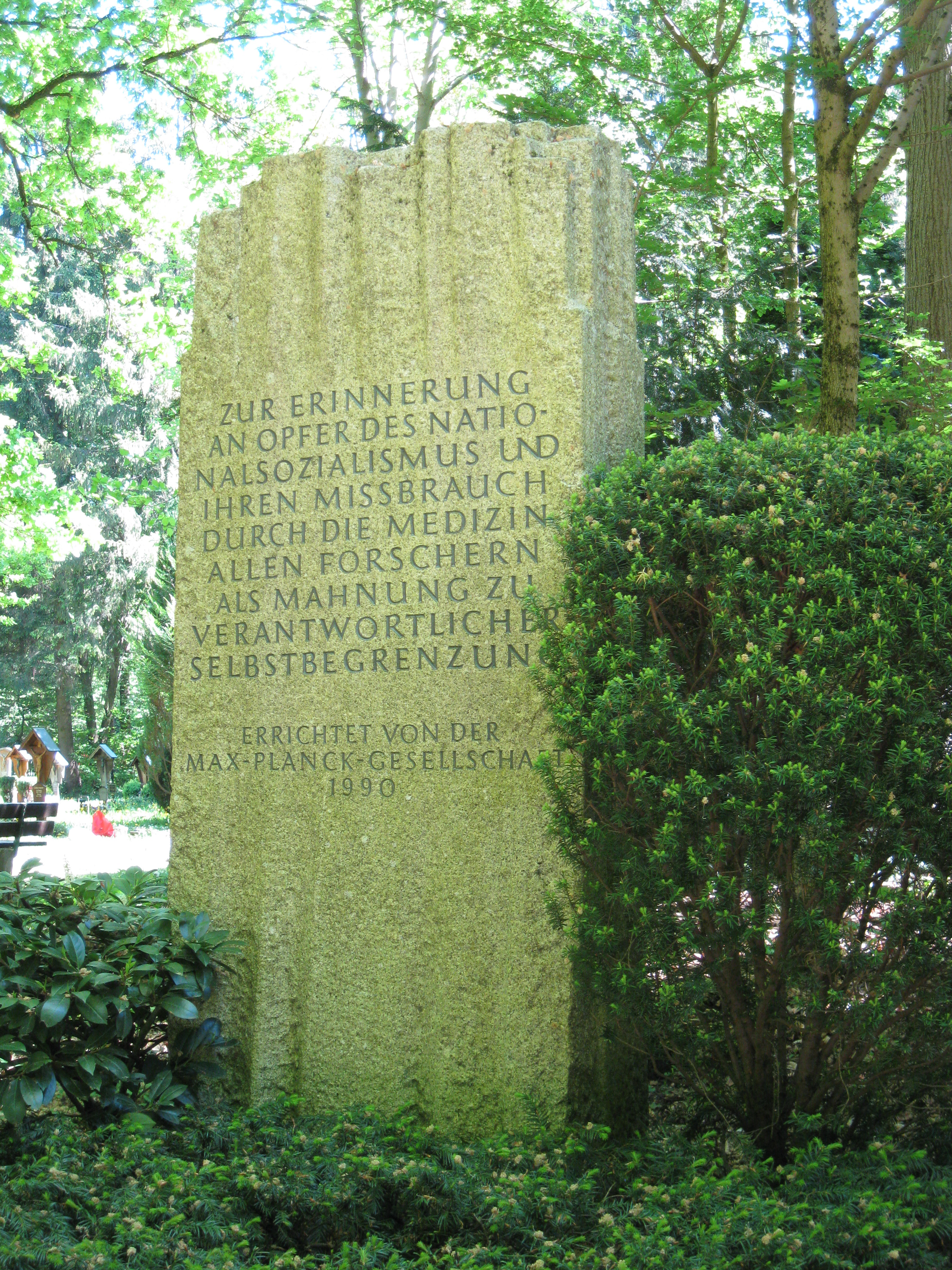 Mahnmal für Opfer der Euthanasie, deren Gehirne in den Kaiser-Wilhelm-Instituten für Psychiatrie (München) und für Hirnforschung (Berlin-Buch) für medizinische Untersuchungen genutzt worden sind.